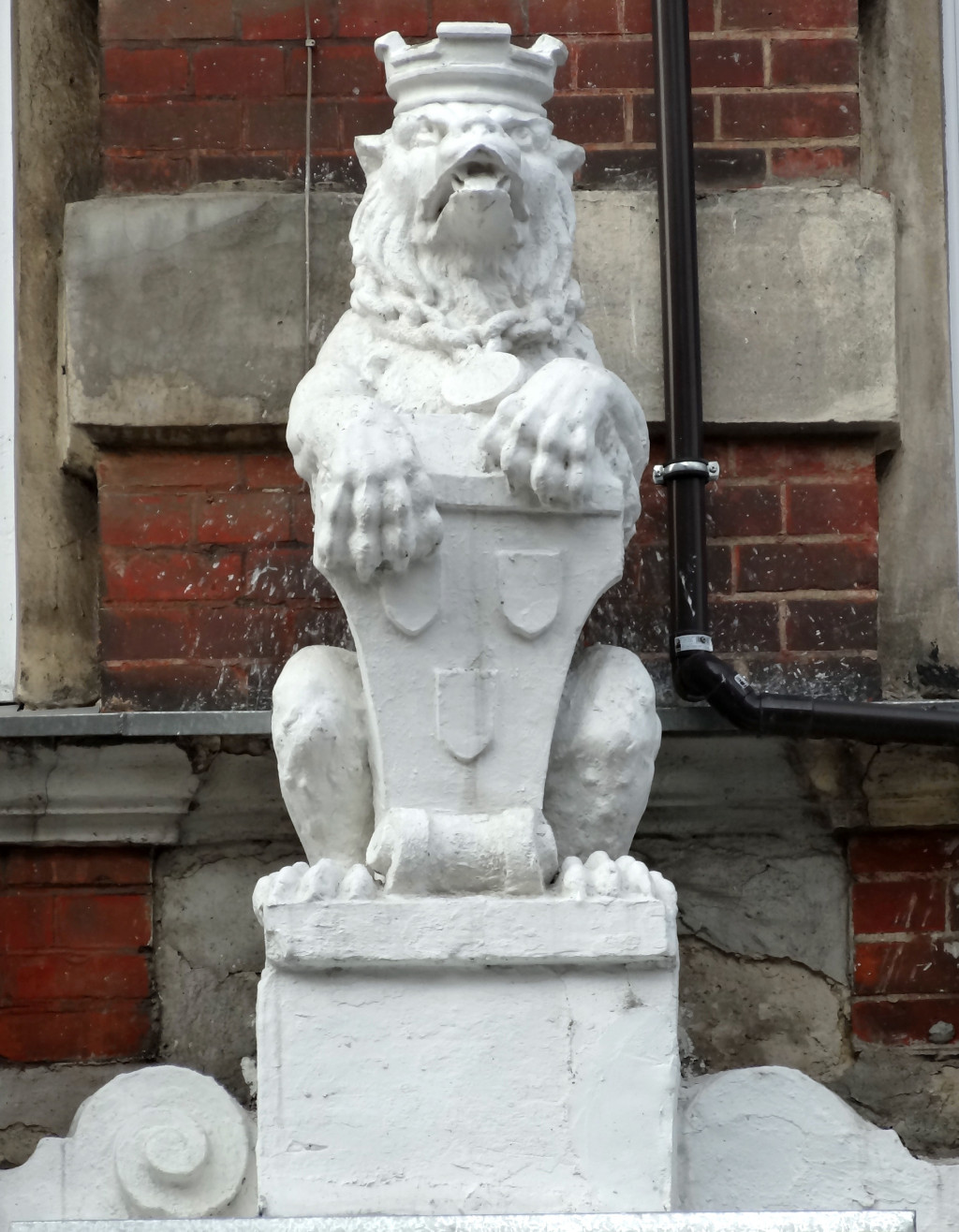 Kamienica przy ul. Dworcowej 84 w Bydgoszczy